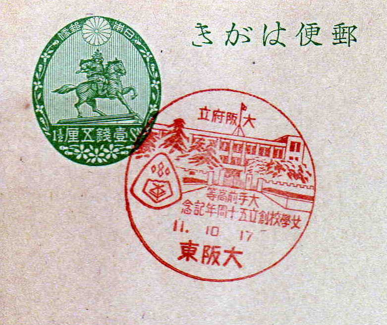 昭和11年10月17日付けの大阪東郵便局の「大阪府立大手前高等女学校創立五十周年記念」の記念印